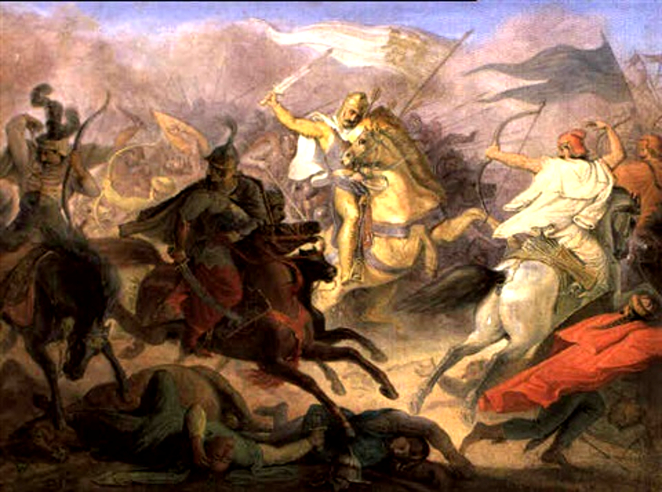 Id Wilhelm Lindenschmit: Luitpold bajor herceg halála a pozsonyi csatában